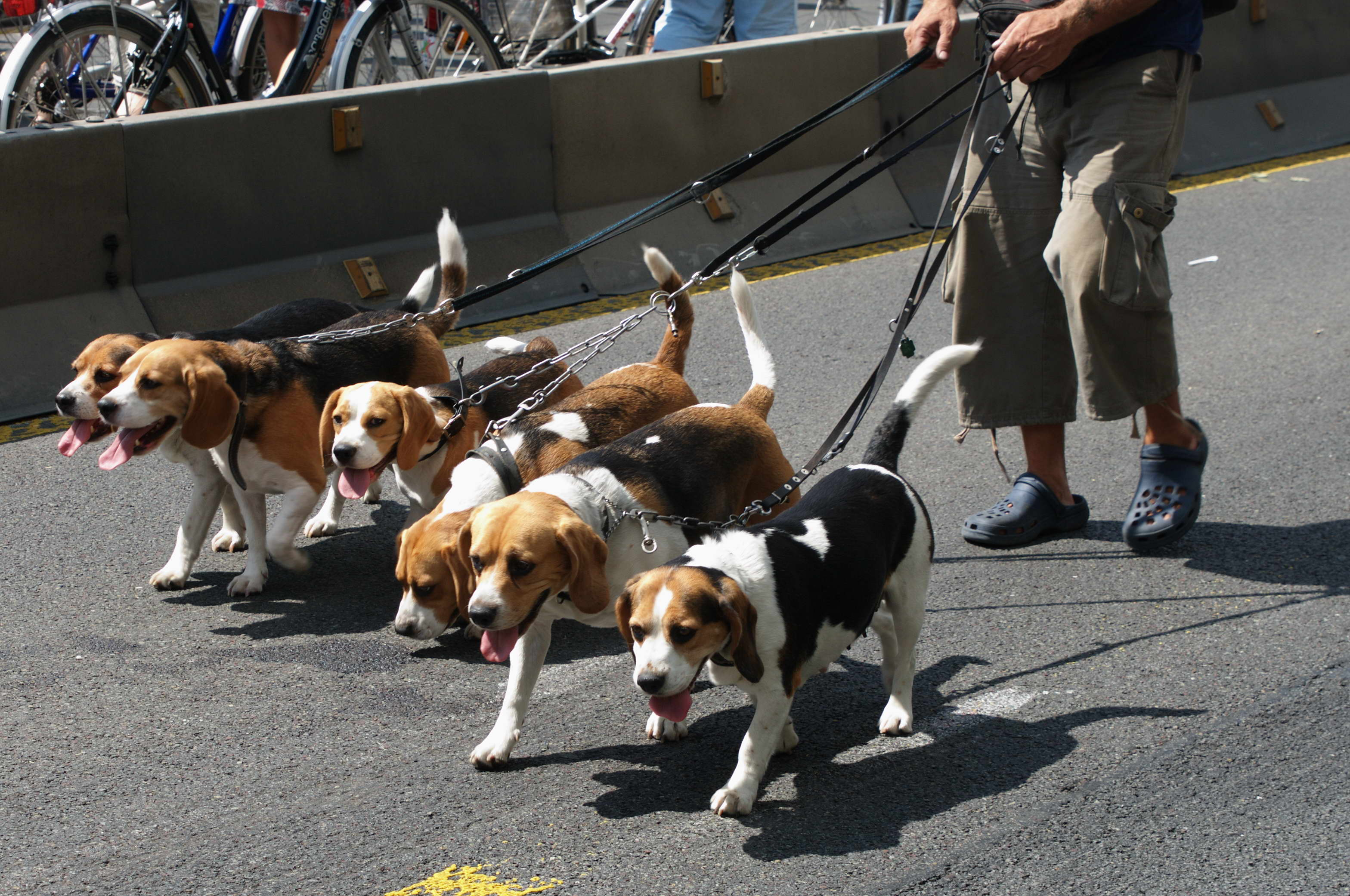 Eine kleine Meute Beagles - mitten auf der A40 anlässlich der Veranstaltung Still-Leben Ruhrschnellweg im Rahmen der RUHR.2010 – Kulturhauptstadt Europas. Aufgenommen in Höhe der Anschlussstelle Bochum-Wattenscheid.